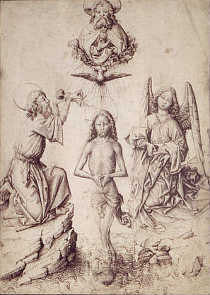 Die Taufe Christi, Federzeichnung, 295 x 215 mm, Paris, Louvre.